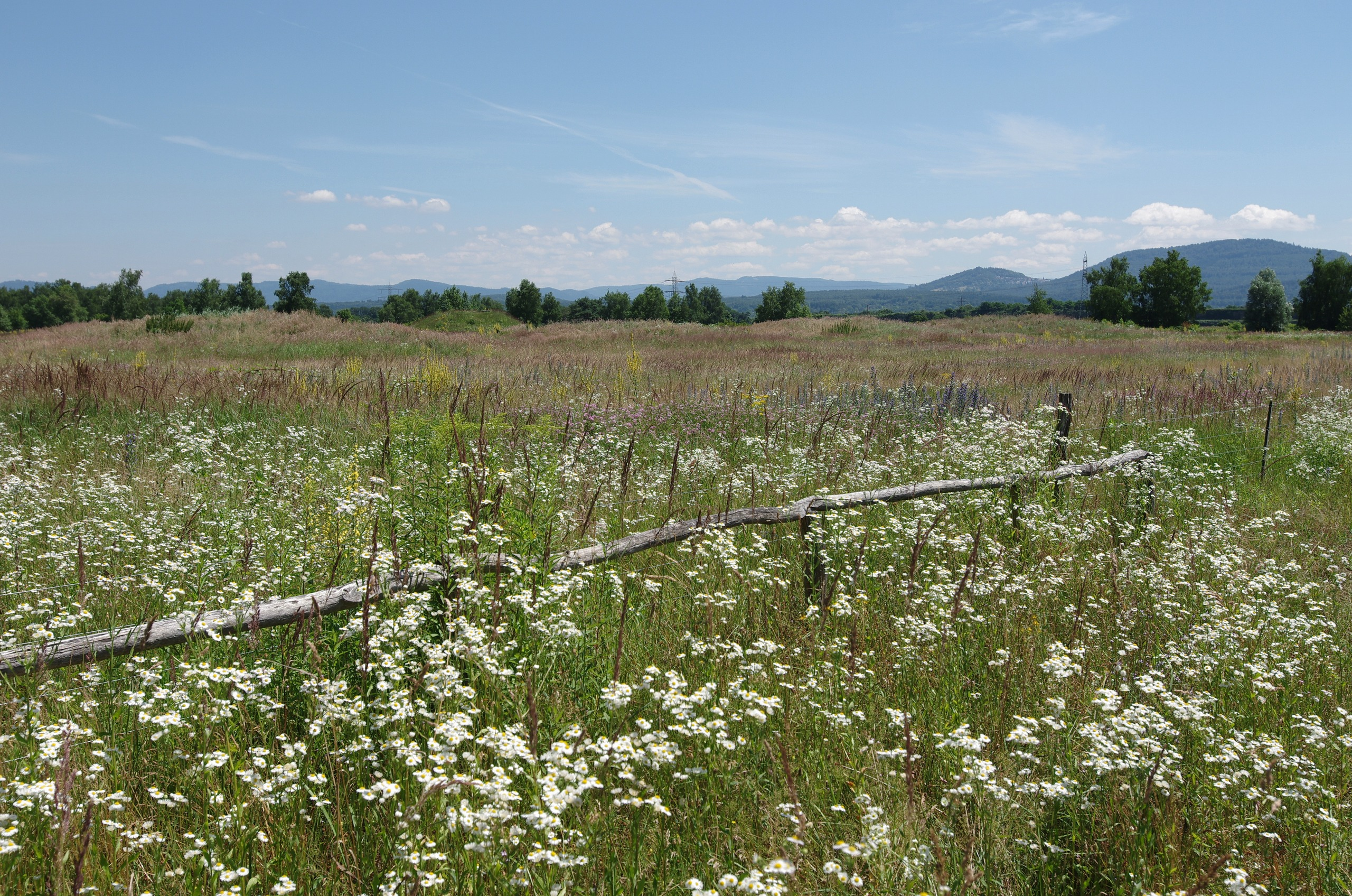 Naturschutzgebiet Sandheiden und Dünen bei Sandweier und Iffezheim